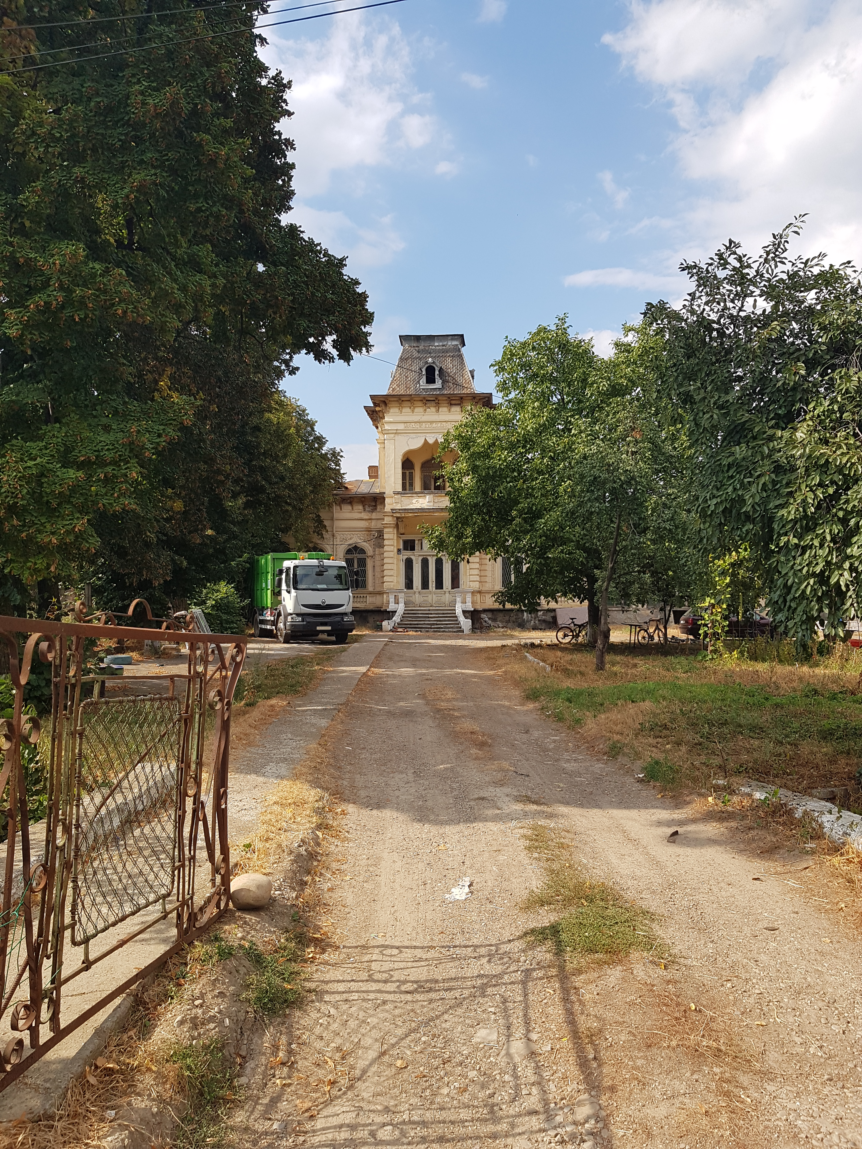 Casa Vianu